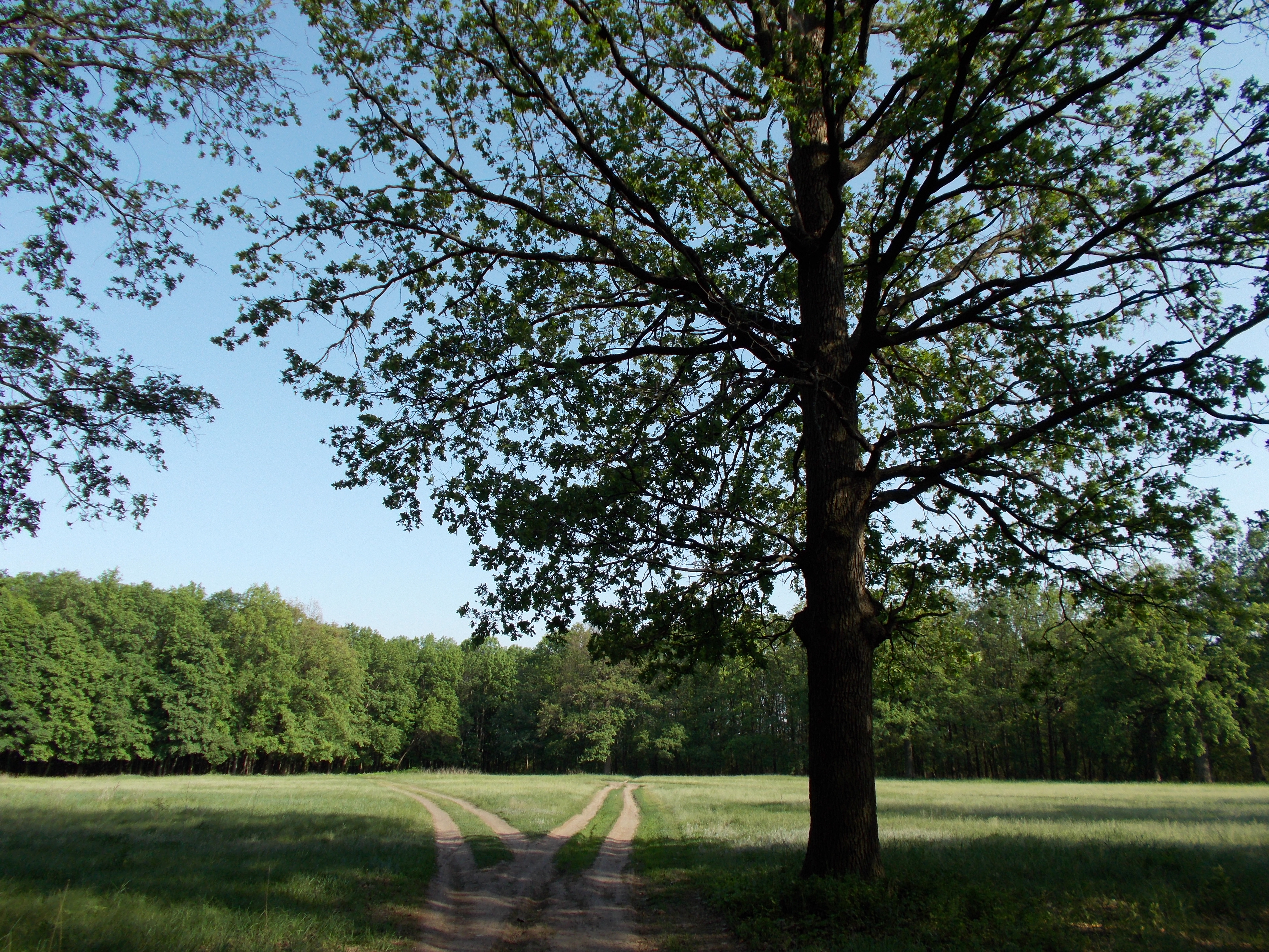 Посреди парка размещена большая поляна. До 2000 года использовалась как футбольное поле